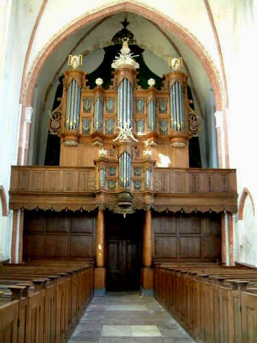 Noordbroek, Schnitgerorgel uit 1696